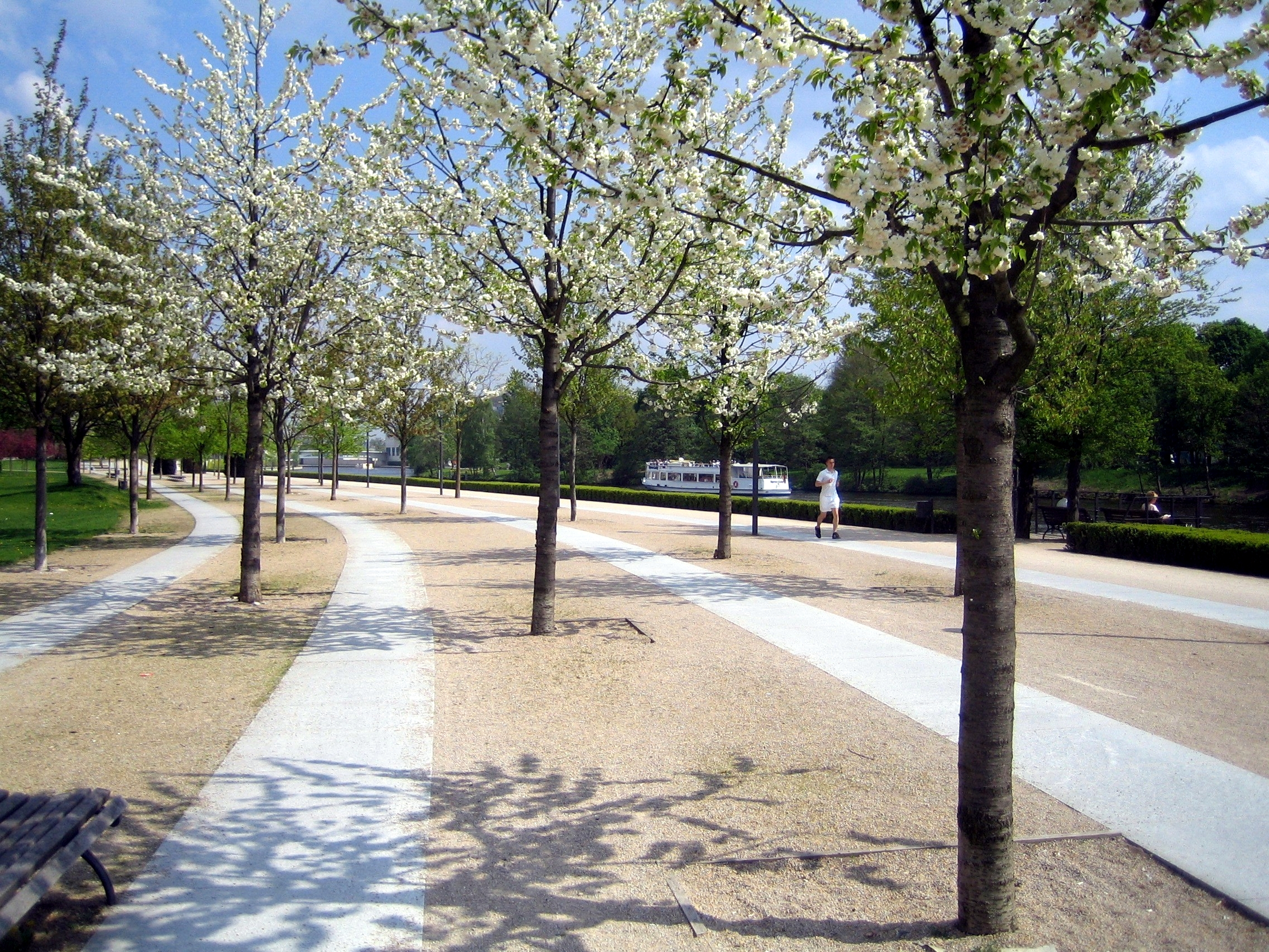 Berlin, Moabiter Werder. Bank promenade near Spree river.